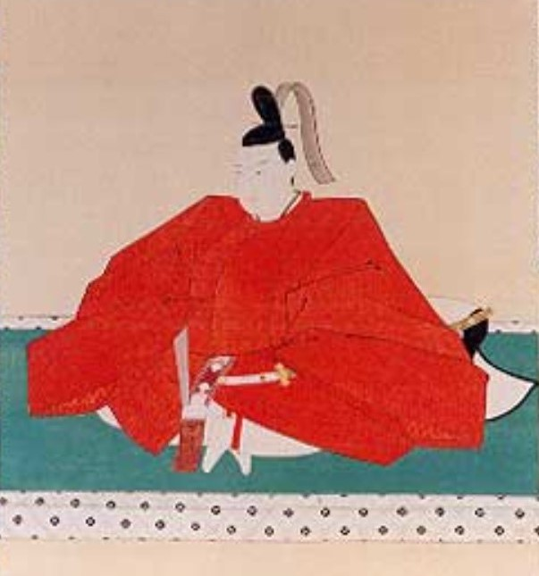 溝口重元の肖像。